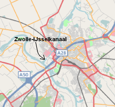 Zwolle-IJsselkanaal